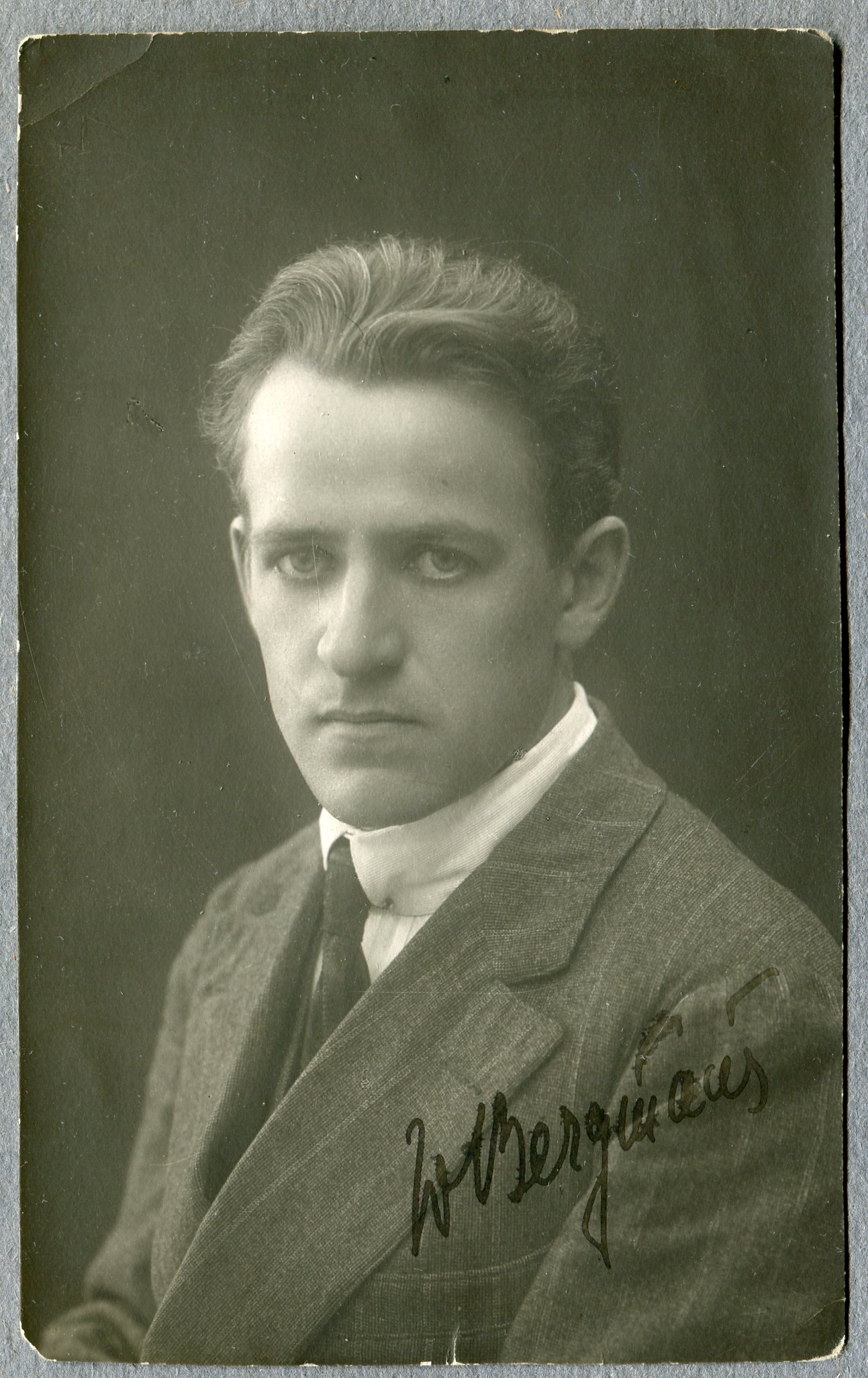 Vilis Bergmanis